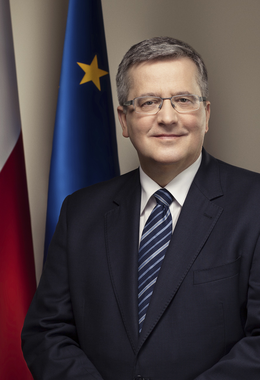 Prezydent Rzeczypospolitej Polskiej Bronisław Komorowski